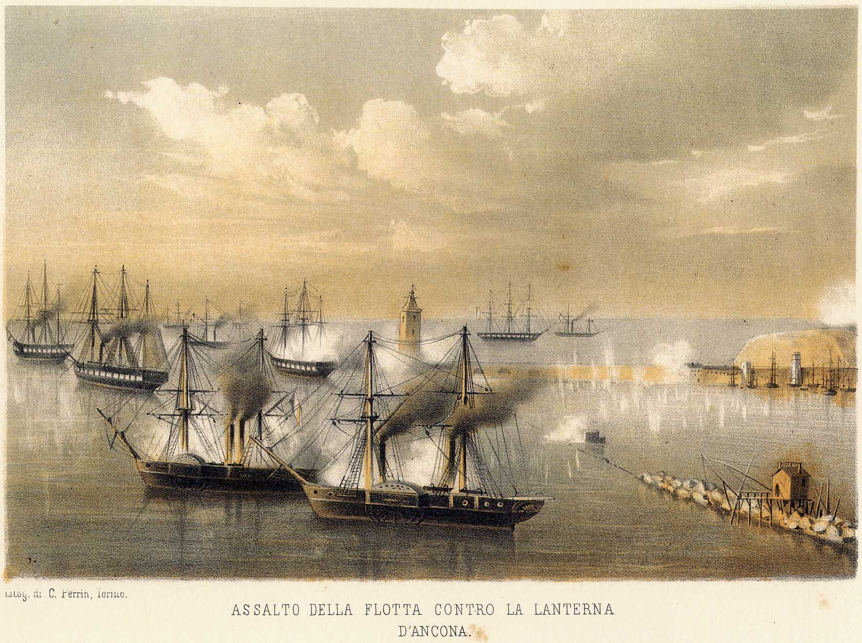 Assalto della flotta contro la lanterna d'Ancona. Litografia a colori, 225 x 153 mm